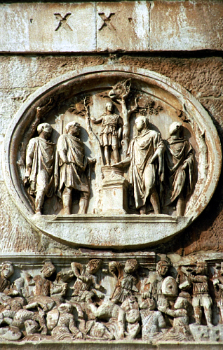 Arco di Costantino a Roma, tondo adrianeo raffigurante il Sacrificio a Diana Arch of Constantine in Rome, Hadrianic tondo representing the Sacrifice to Diana